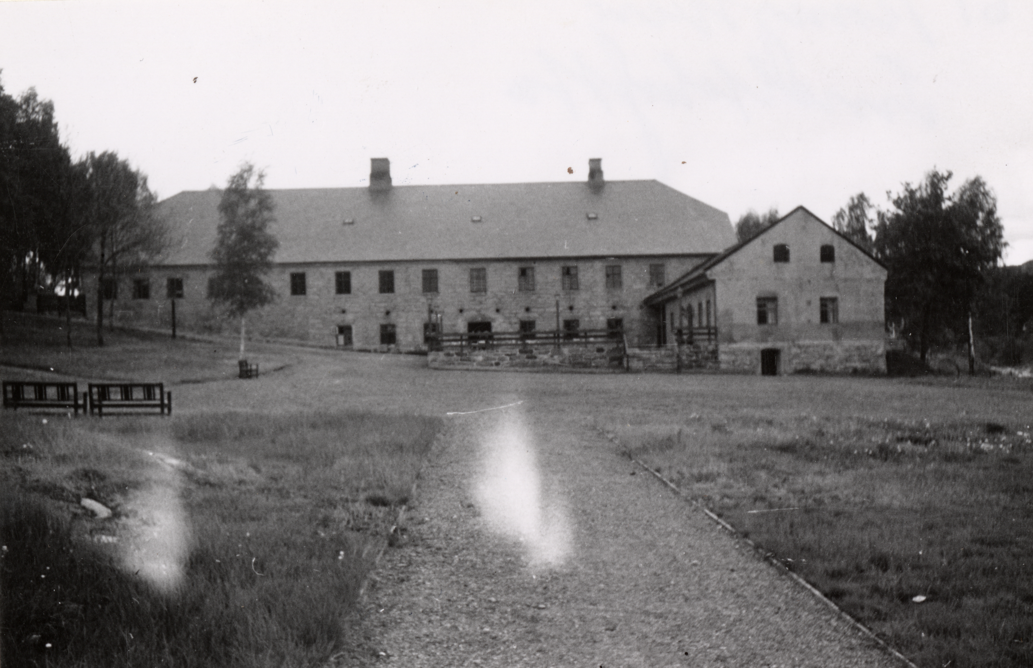 Den kongelige mynt, Den kgl. mynt i Kongsberg, Buskerud This image on crowdsourcing geotagging platform Fotodugnad